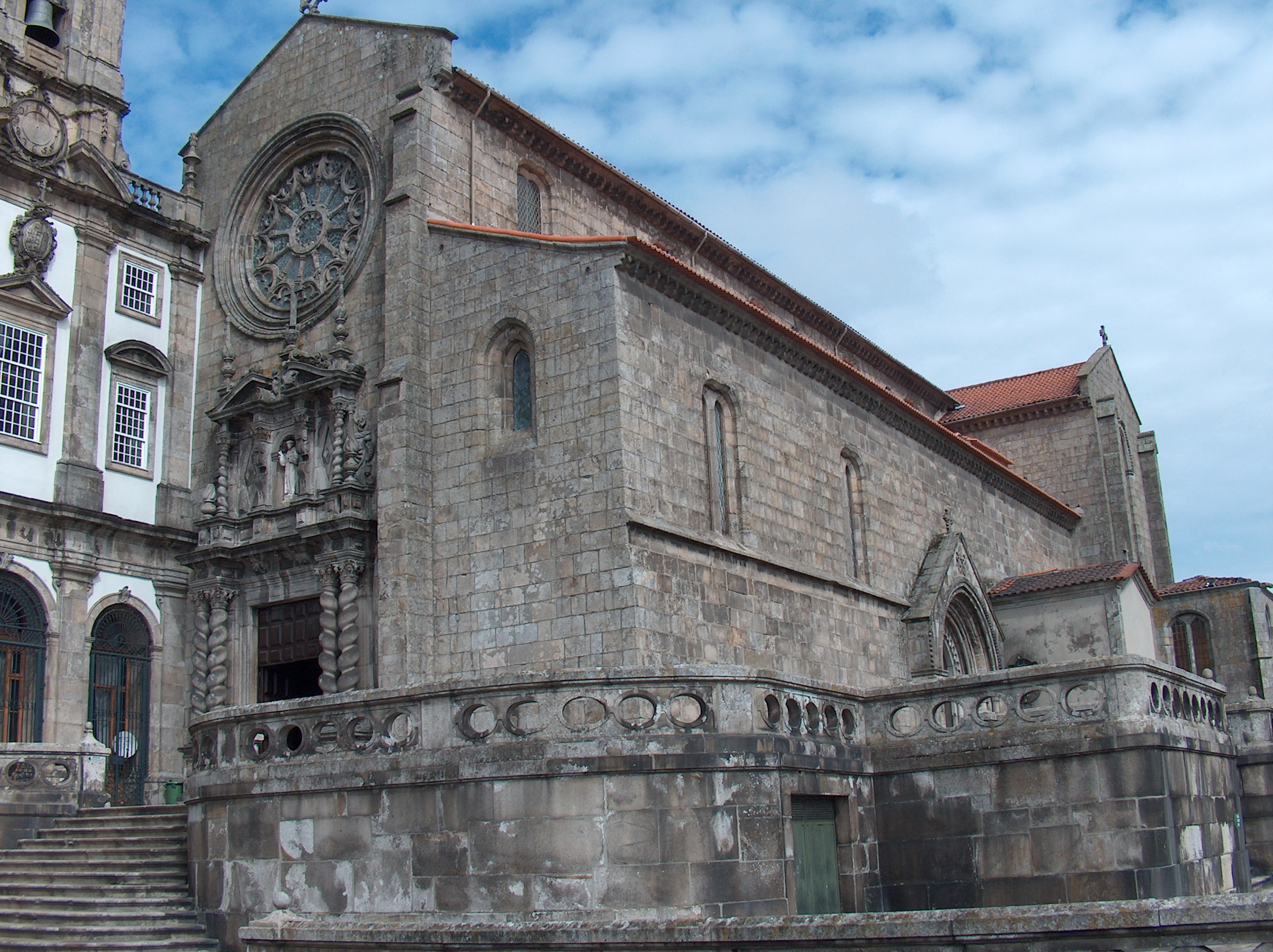 Igreja de São Francisco (Porto) This file was uploaded for Wiki Loves Monuments in Portugal with the unique identifier 70199.